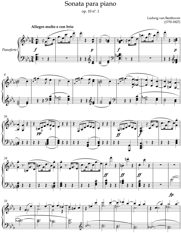 Primera página de la sonata para piano op.10 nº1 editada en Sibelius